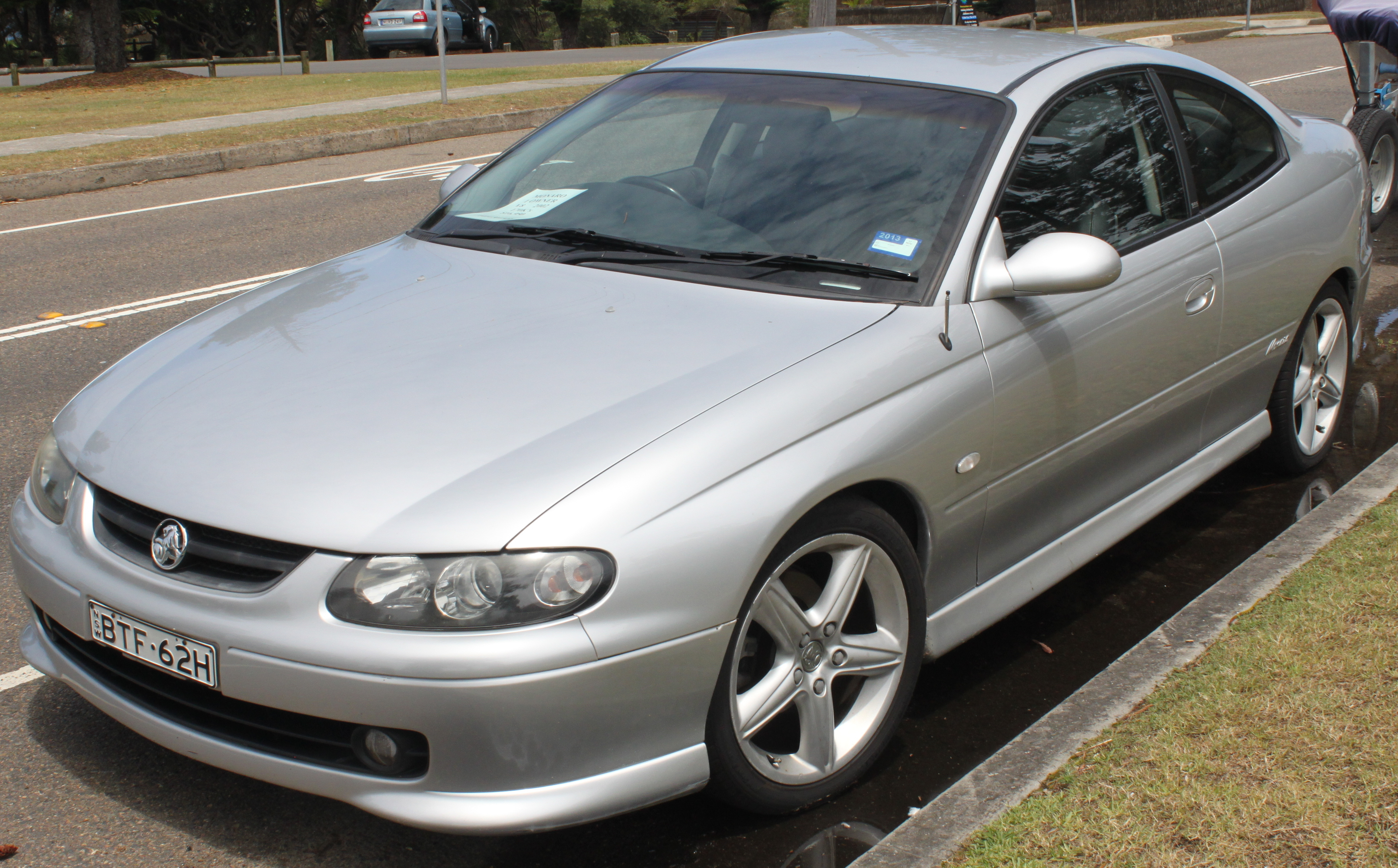 Holden Monaro V2 CV8